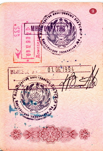 выездная виза в загранпаспорте СССР